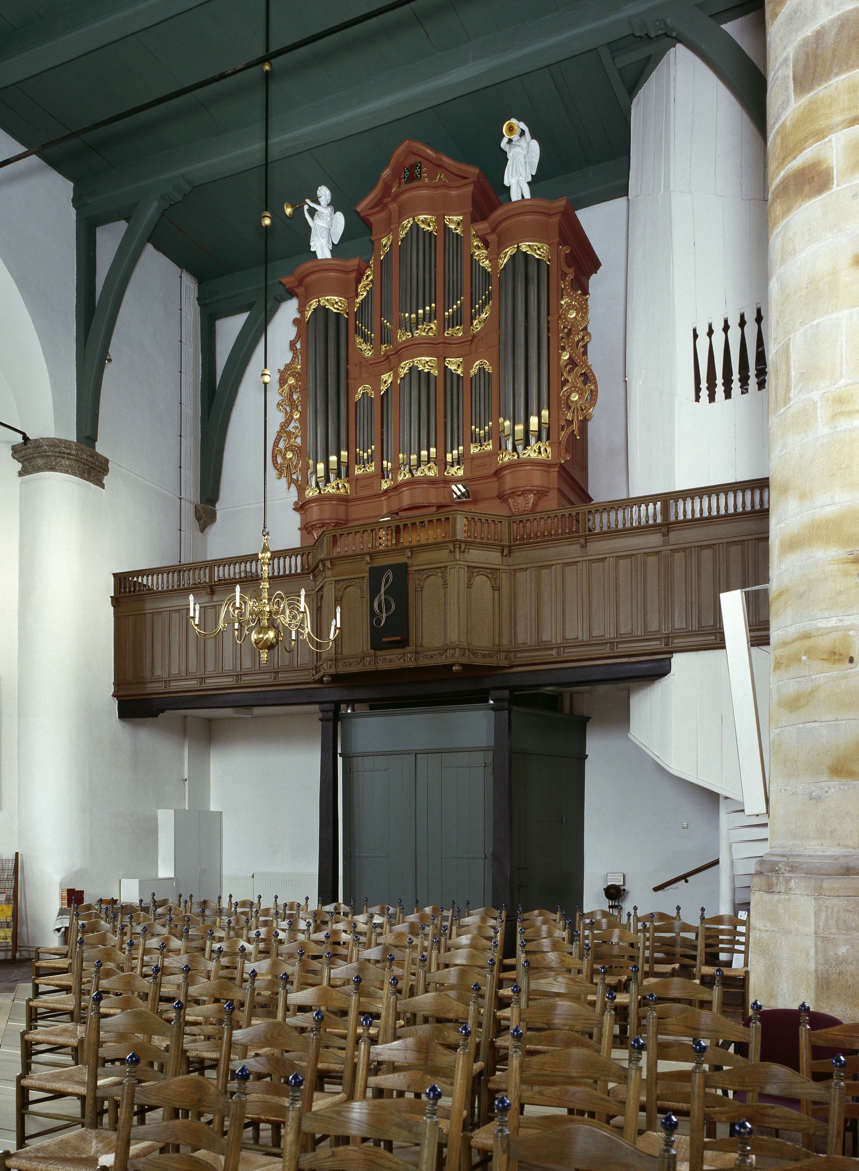 Nederlands Hervormde Kerk: Interieur, aanzicht orgel, orgelnummer 266 (opmerking: Gefotografeerd voor Het Historische Orgel in Nederland 1894-1901, bladzijde 155)